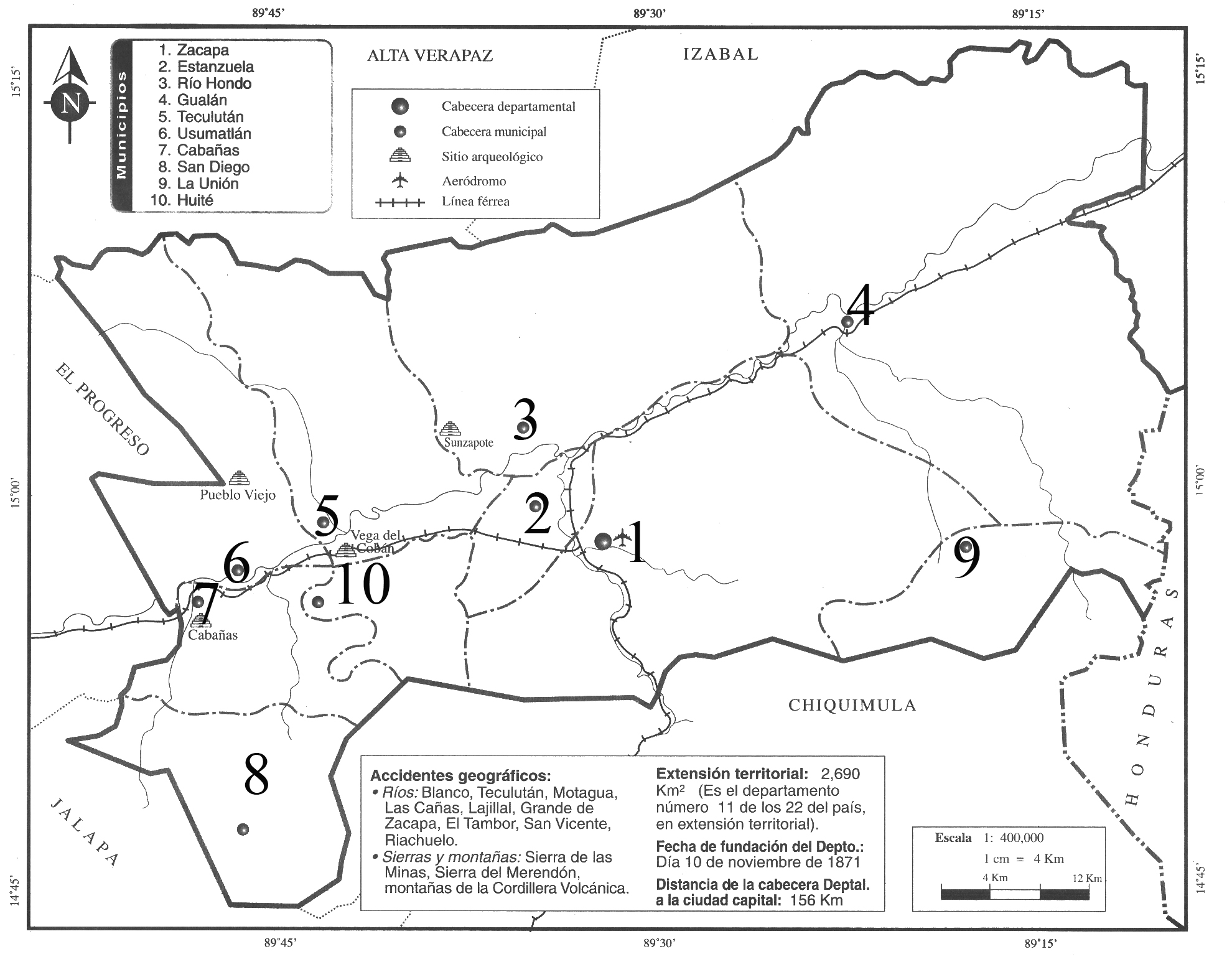 Imagen digitalizada del departamento de Zacapa con sus 10 municipios. debidamente localizados, por mi ya que la publicación original no contenía localización.